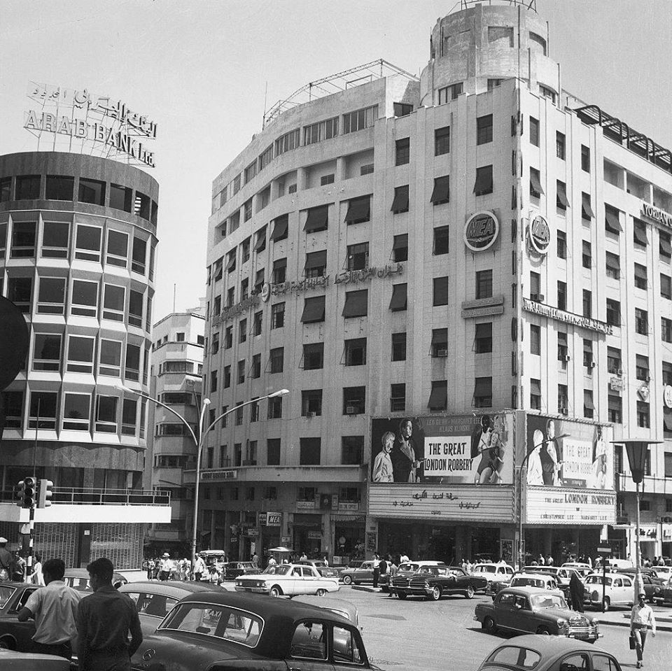 رياض الصلح مبنى الكبيتول والبنك العربي ١٩٦٩